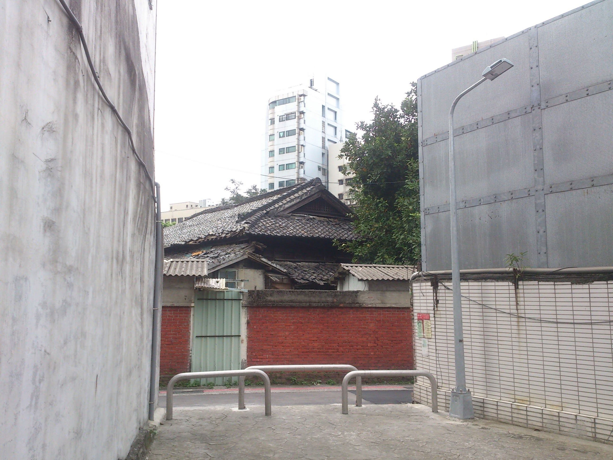 前南菜園日式宿舍，牯嶺街81巷6、8號的右側（靠南昌路二段4巷）。